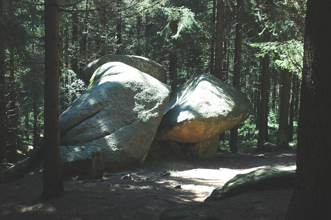 Dreibodesteine bei Sankt Andreasberg (Harz)